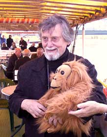 Klippert